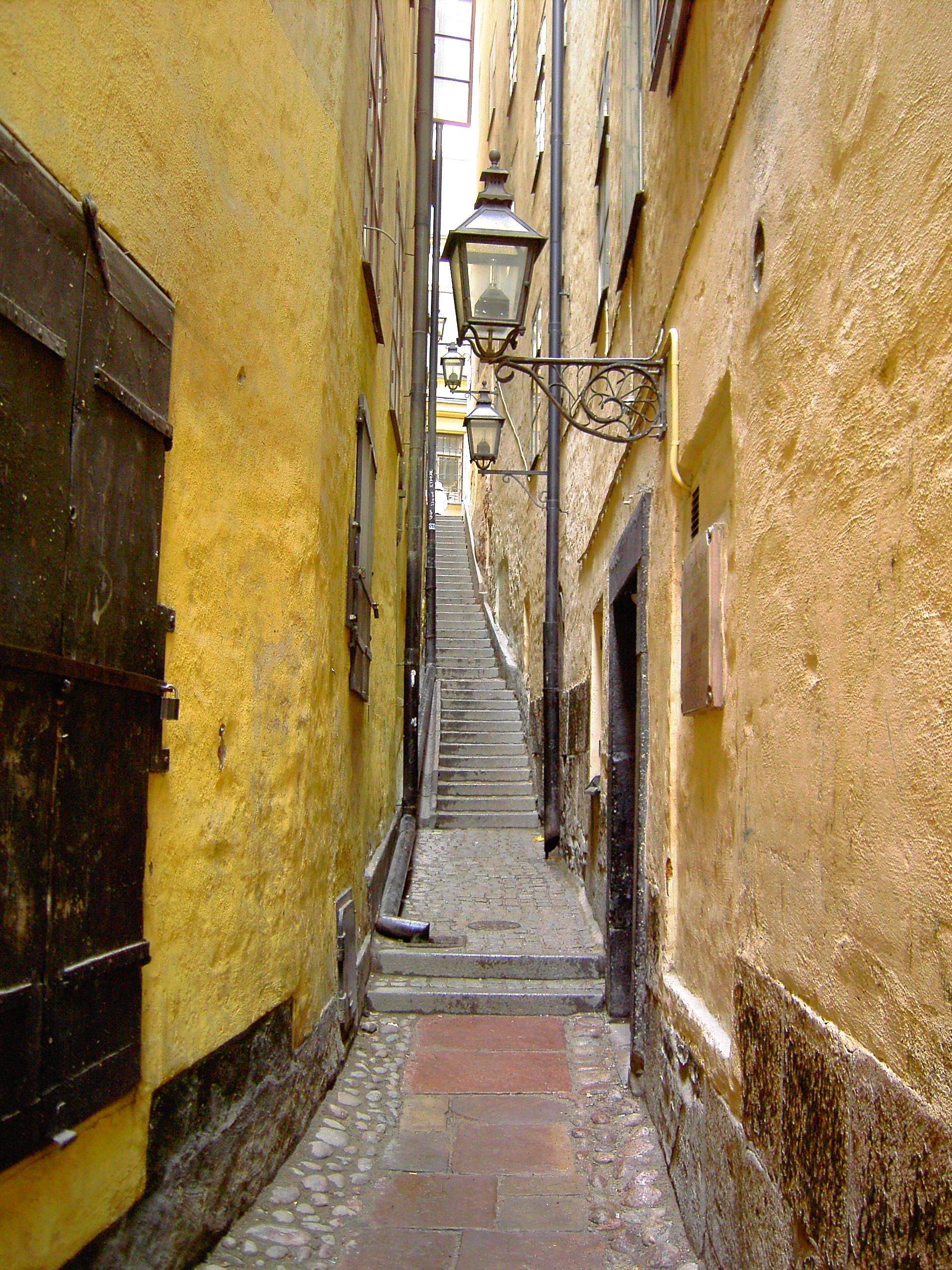 Marten Trotzigs gränd, Gamla stan, Stockholm, Sweden